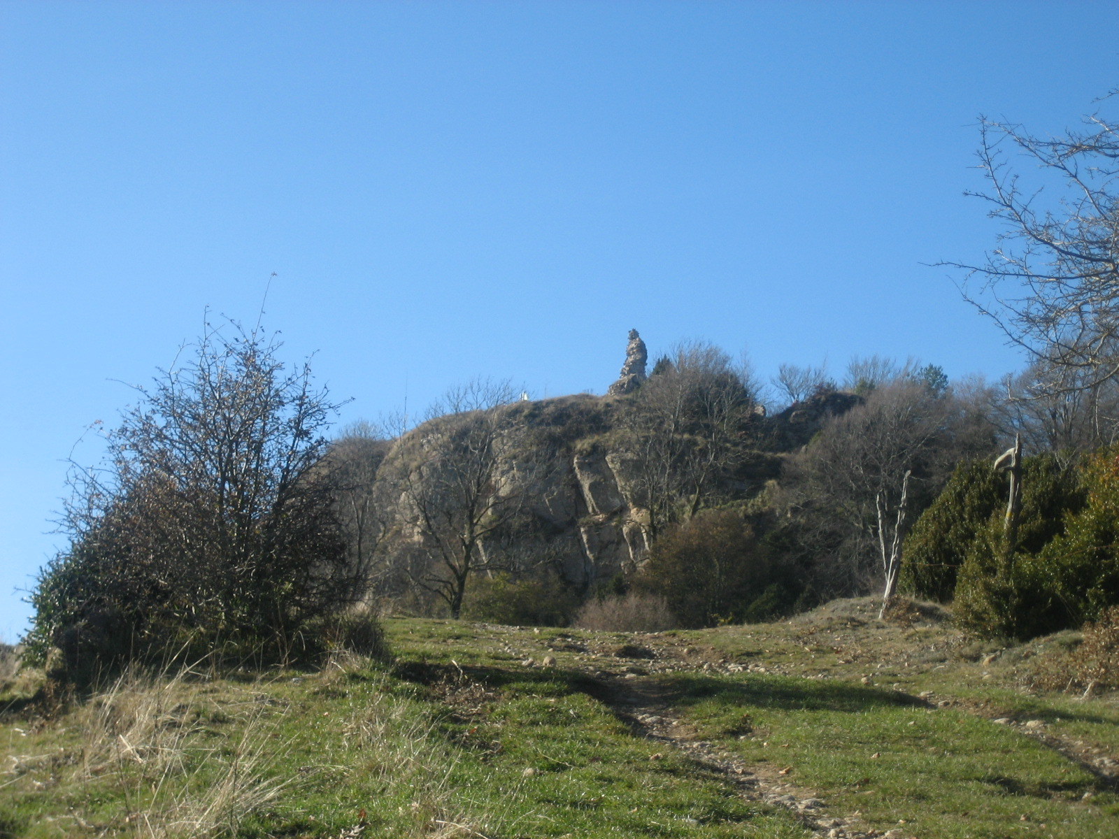 Milany This is a a photo of an emblematic summit in Catalonia, Spain, with id: CE-292089006